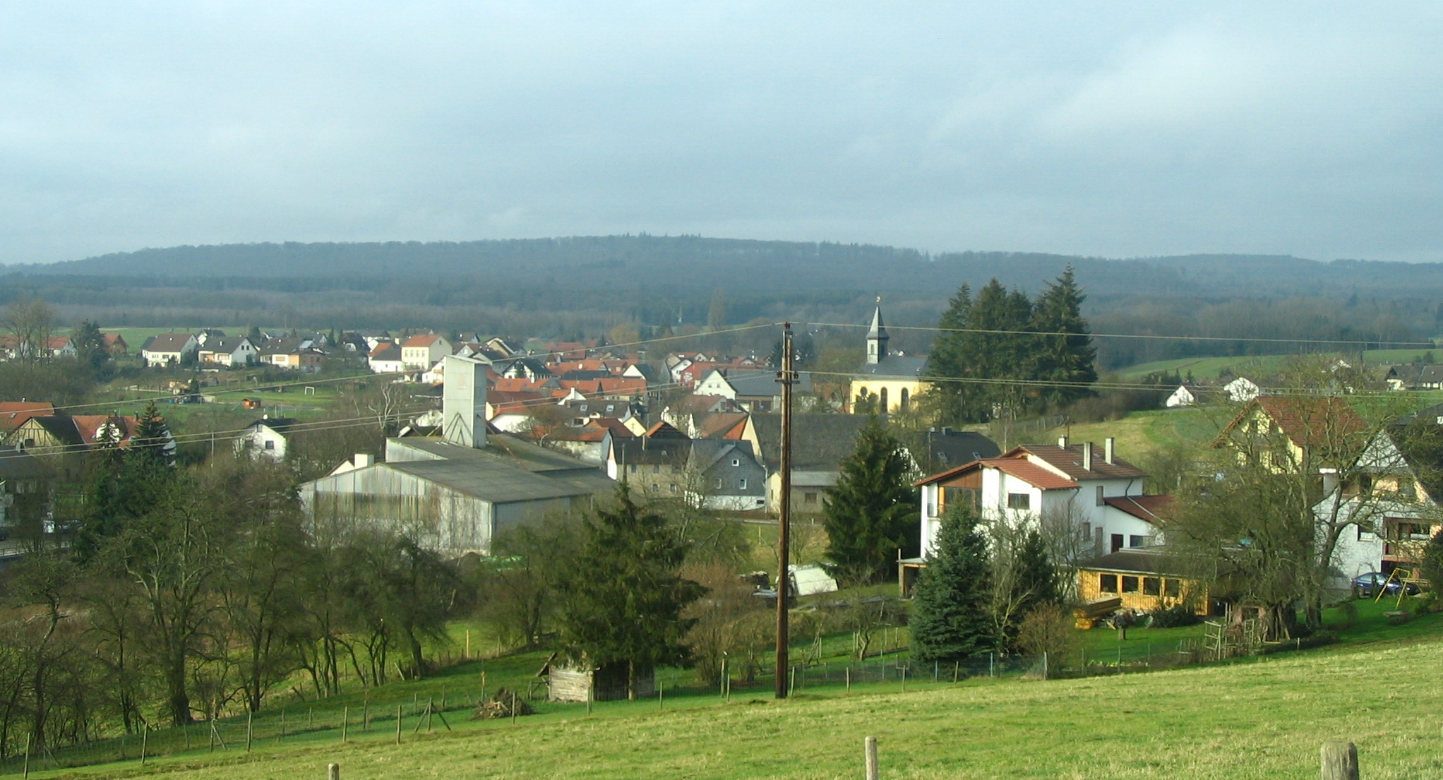 Winterbach am Soonwaldrand